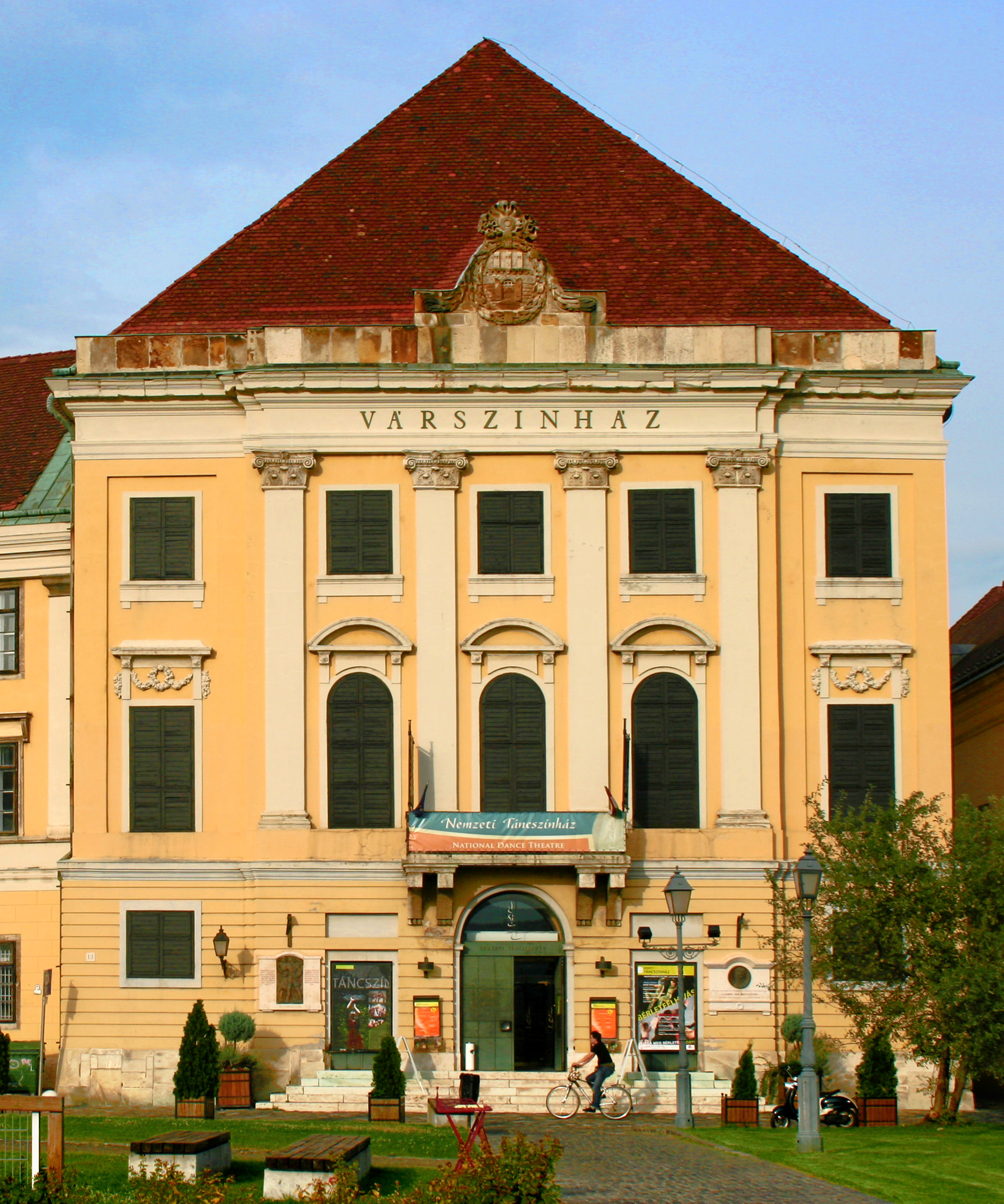 Castle Theatre Budapest, recovered: 1787.